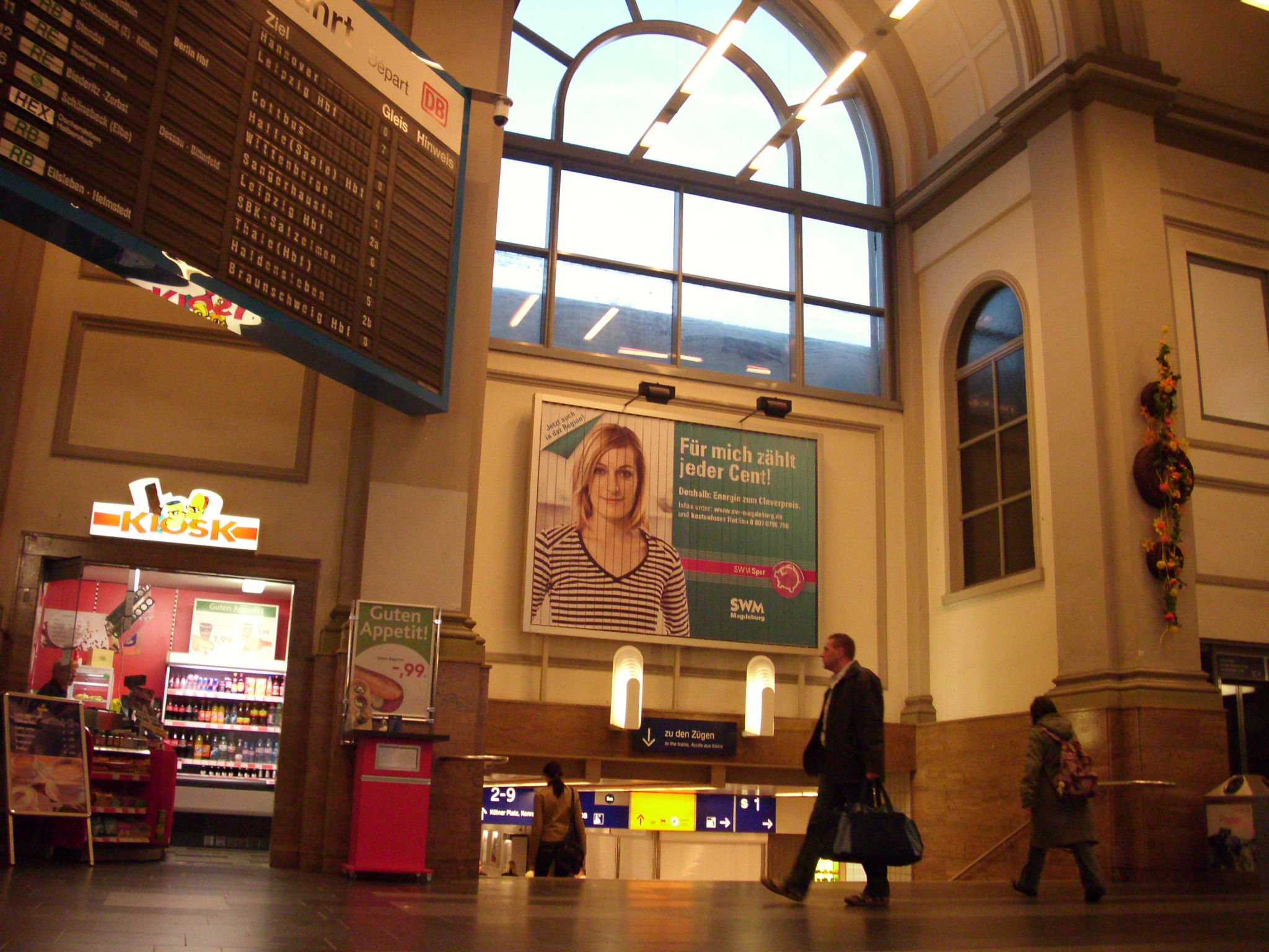 Treppe zur Halle mit den Bahnsteigen am Hauptbahnhof Magdeburg.